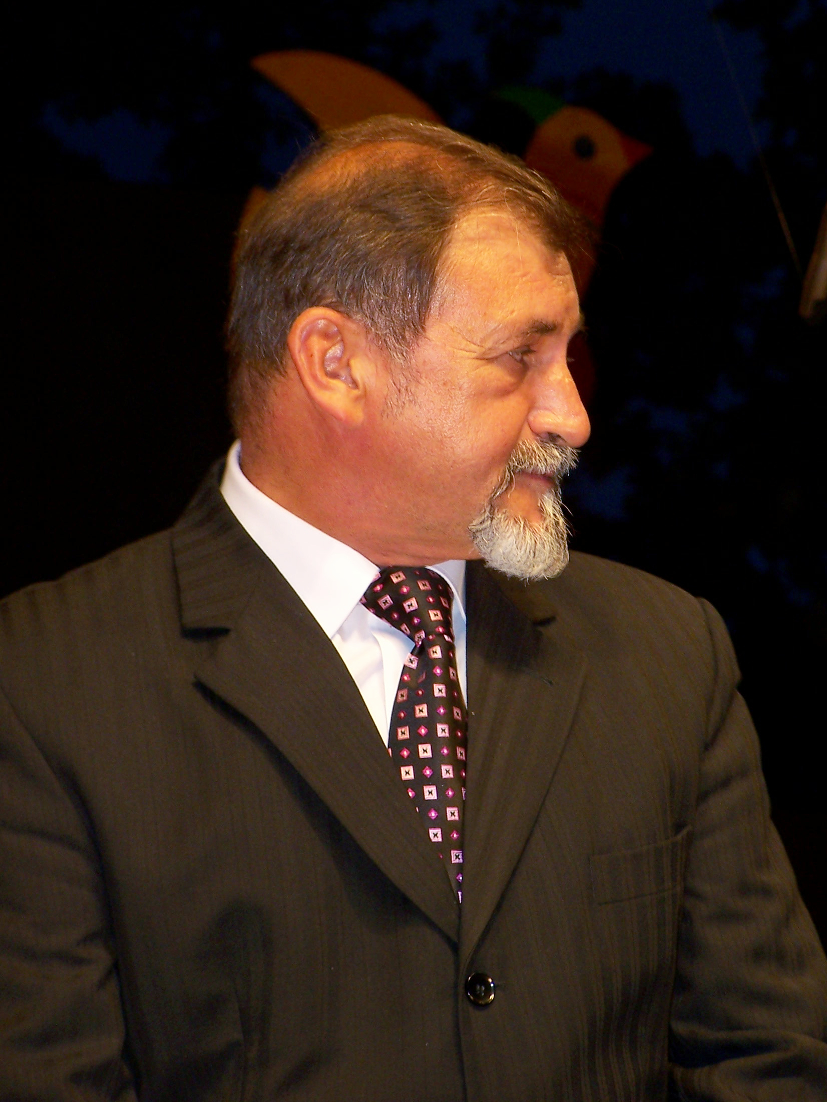 Antoni Szlagor (burmistrz miasta Żywiec) podczas 43. Tygodnia Kultury Beskidzkiej w Żywcu.